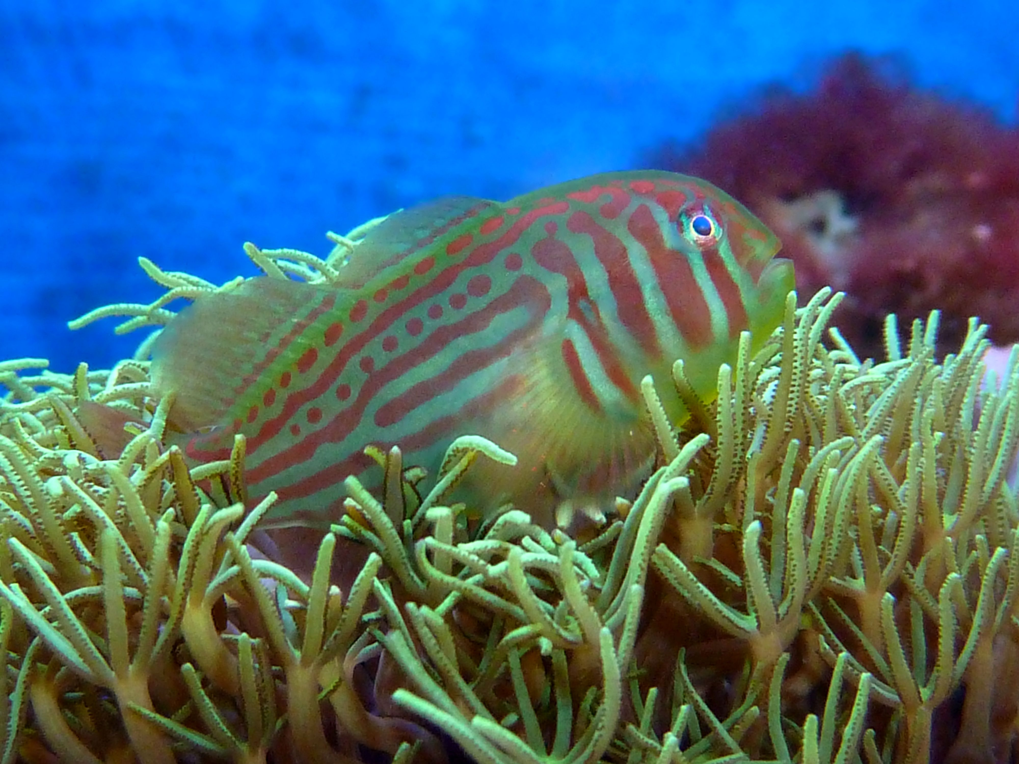 Gobiodon histrio in Weichkoralle